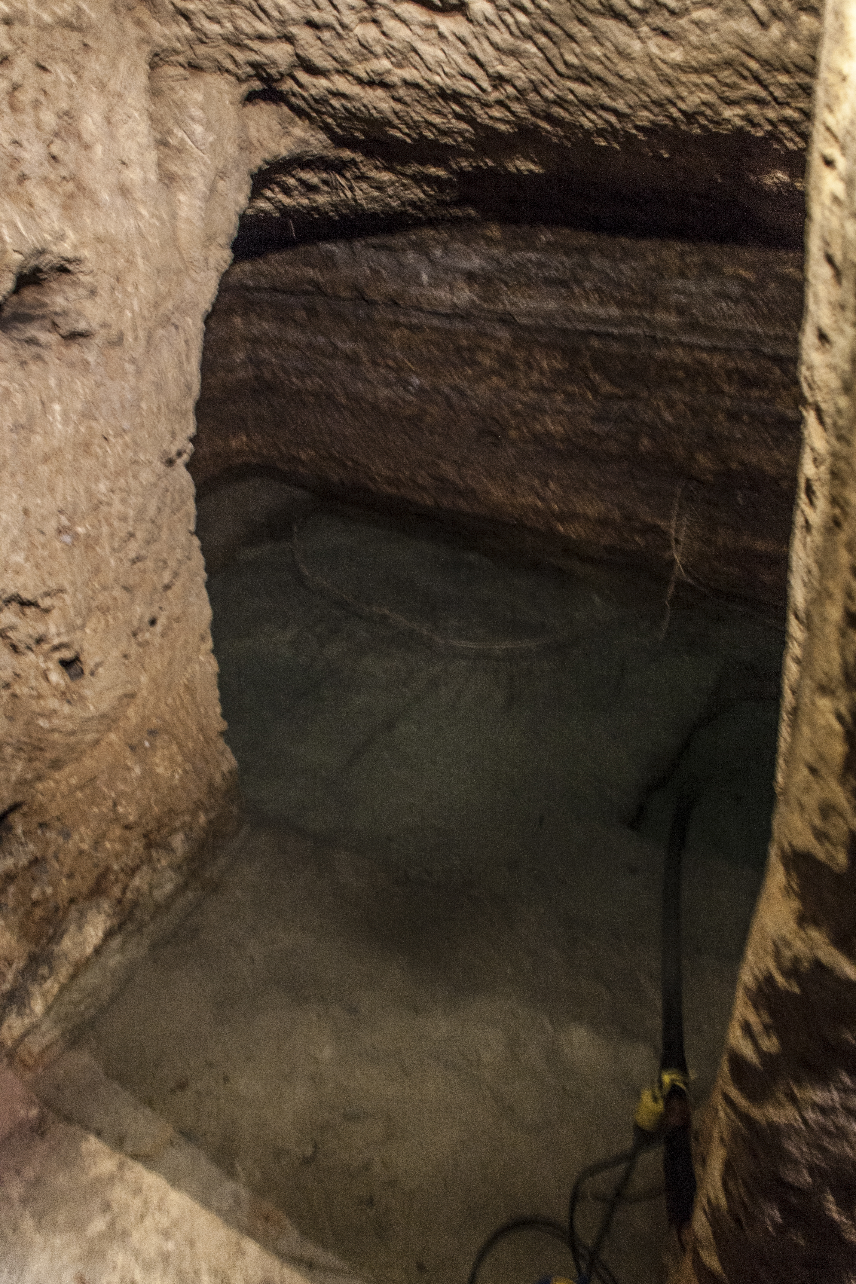 la vasca